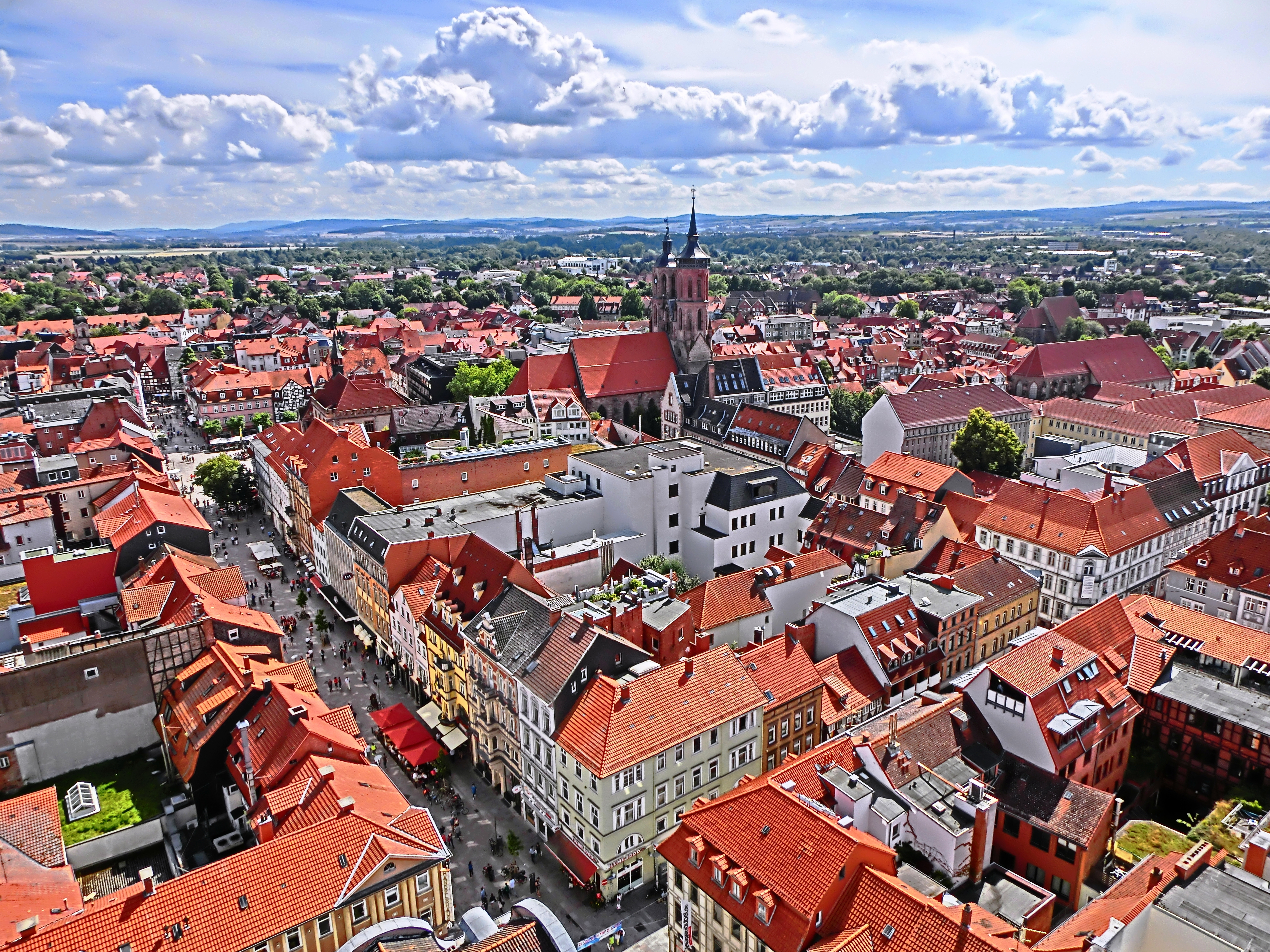 Innenstadt, Göttingen, Germany